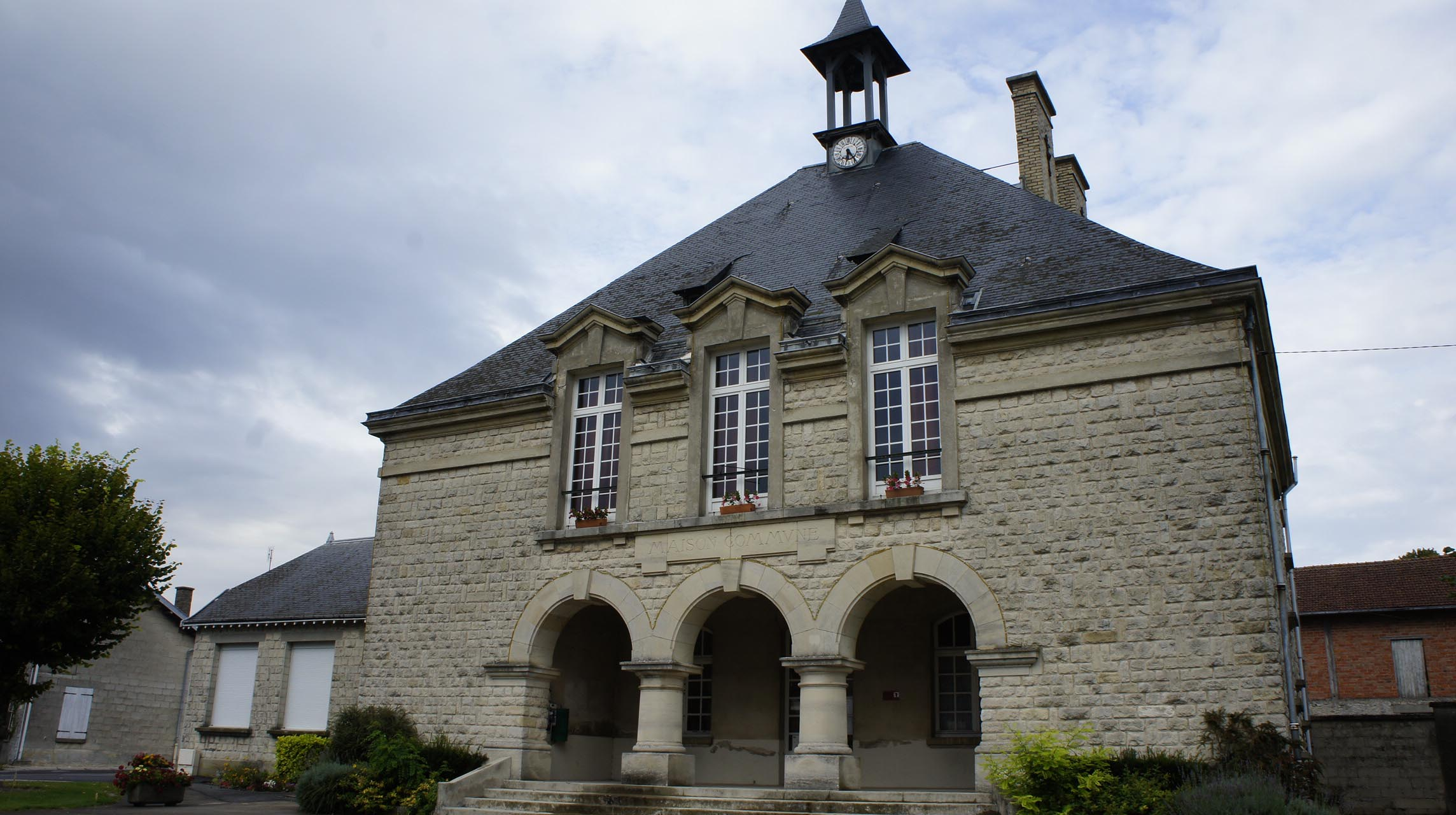 Mairie de st-Hilaire le grand.